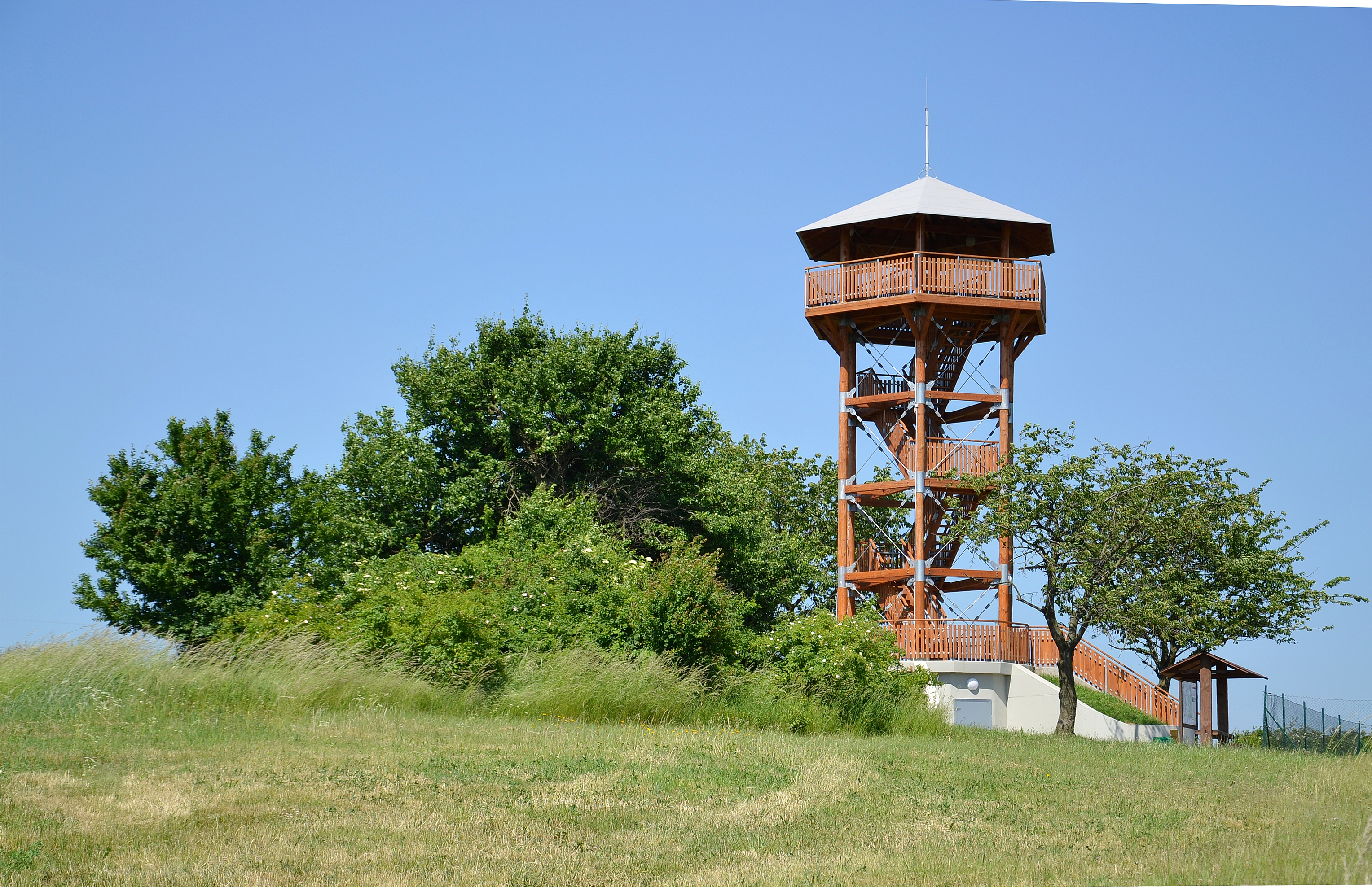 Rozhledna Žernovník, okres Blansko